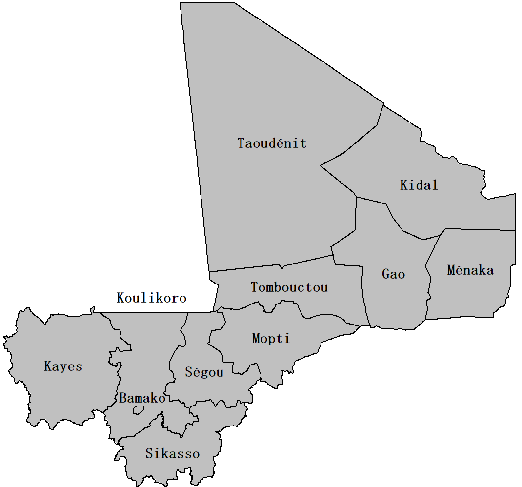 2016年以降のマリ共和国の第一級行政区画。 参考資料-Active USG Programme for the Mali Response (Last updated 09.14.17) from US Agency for International DevelopmentMali: Aperçu de l’accès humanitaire (bilan des contraintes de janvier à décembre 2017) from UN Office for the Coordination of Humanitarian Affairs